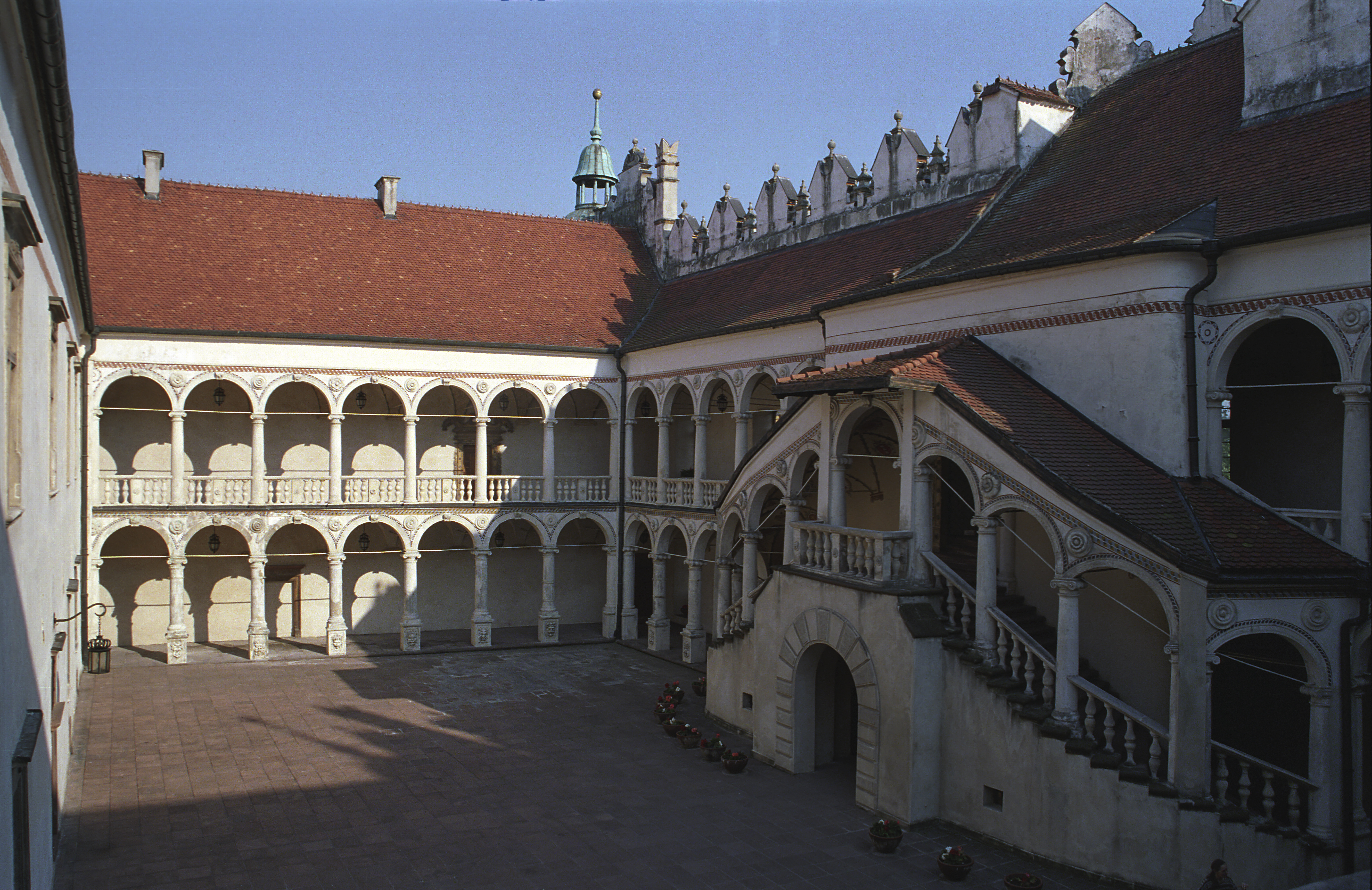 Baranów Sandomierski Castle